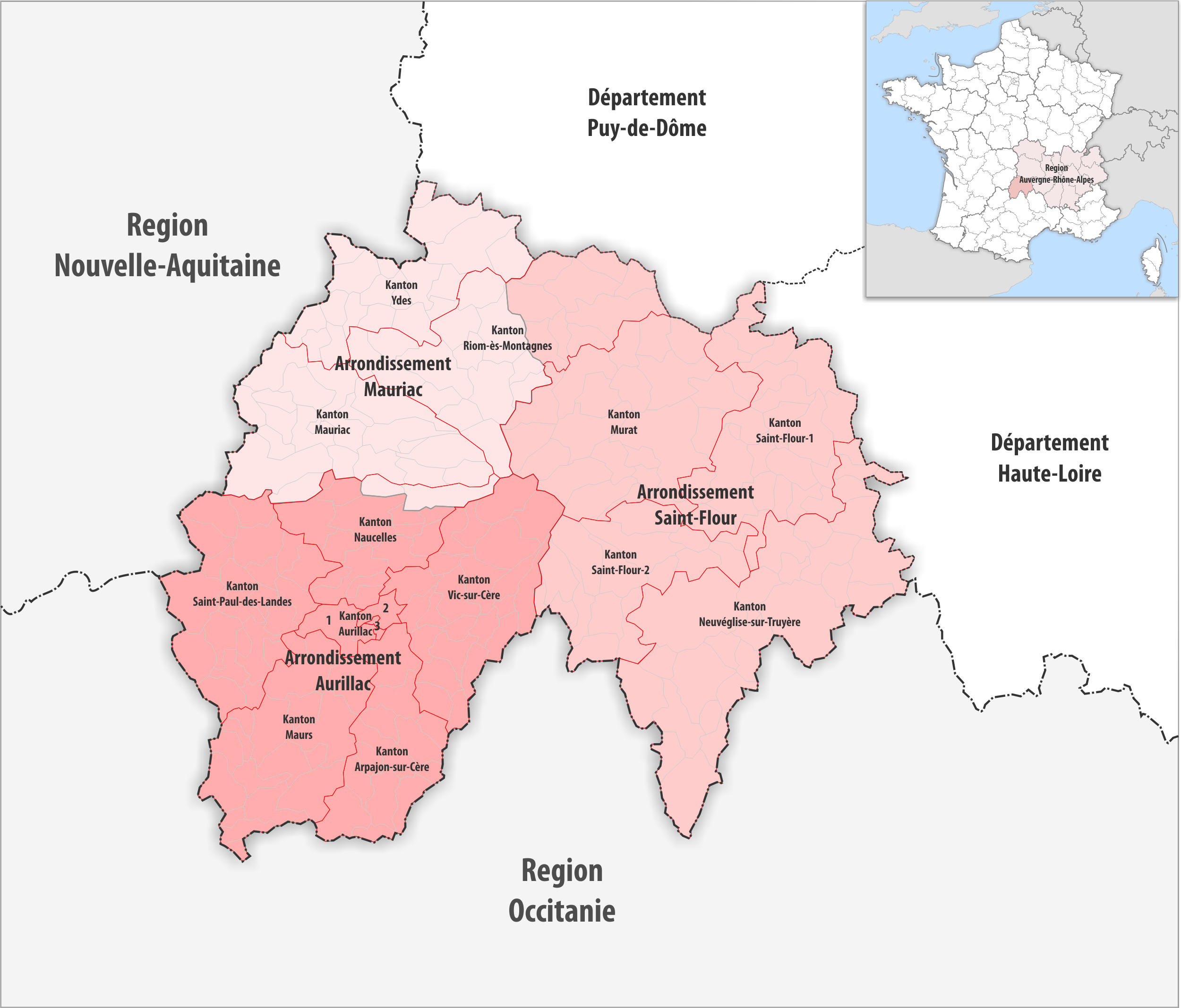 Gemeinden, Kantone und Arrondissemente im Departement Cantal